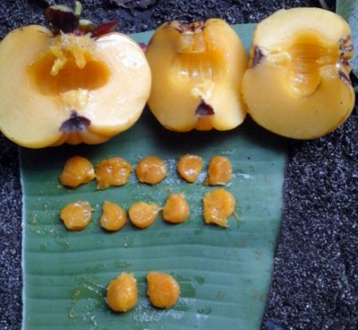 Buah Asam Gelugur dan Bijinya.